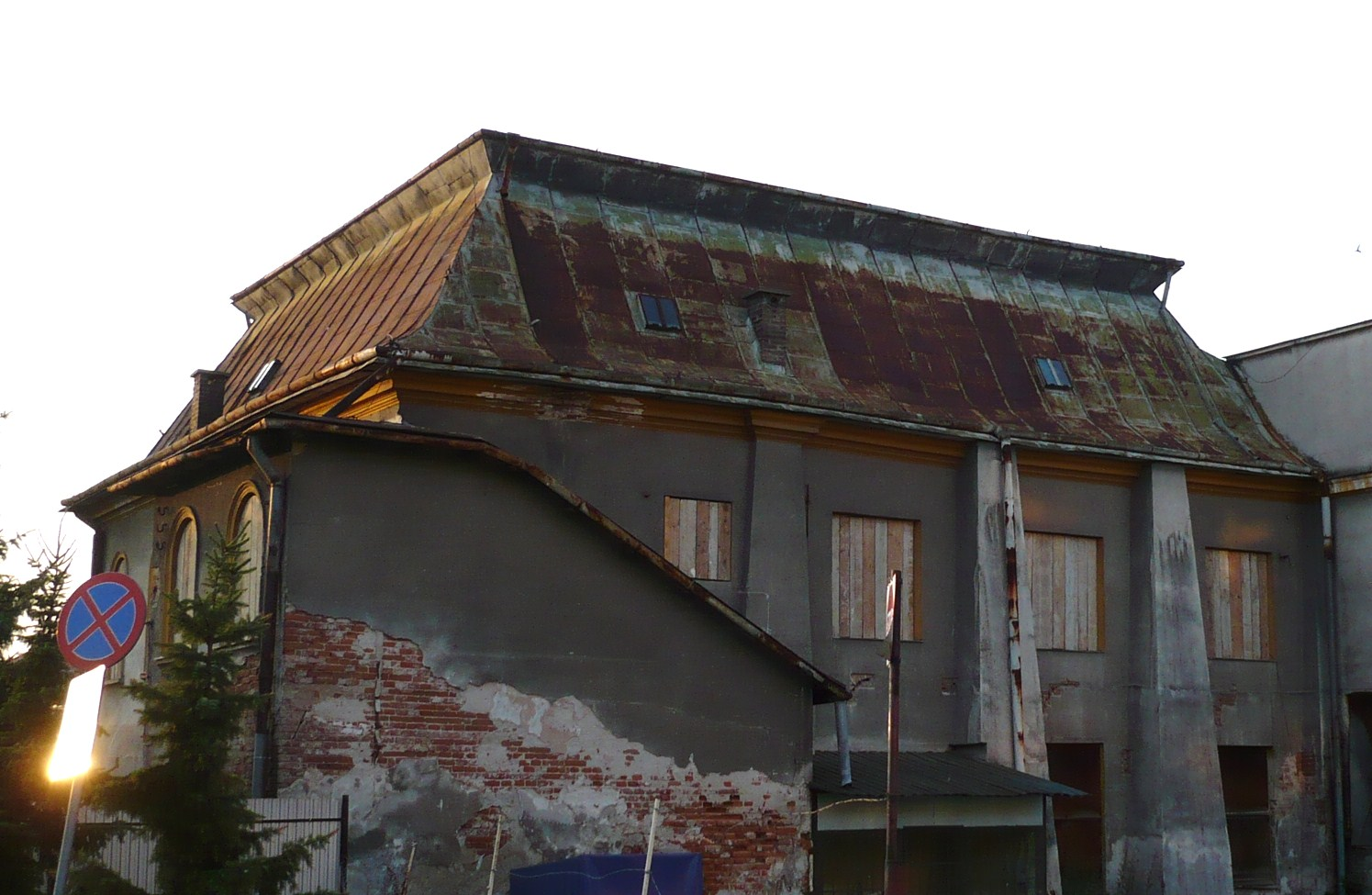 Przemyśl, Synagoga Zasańska